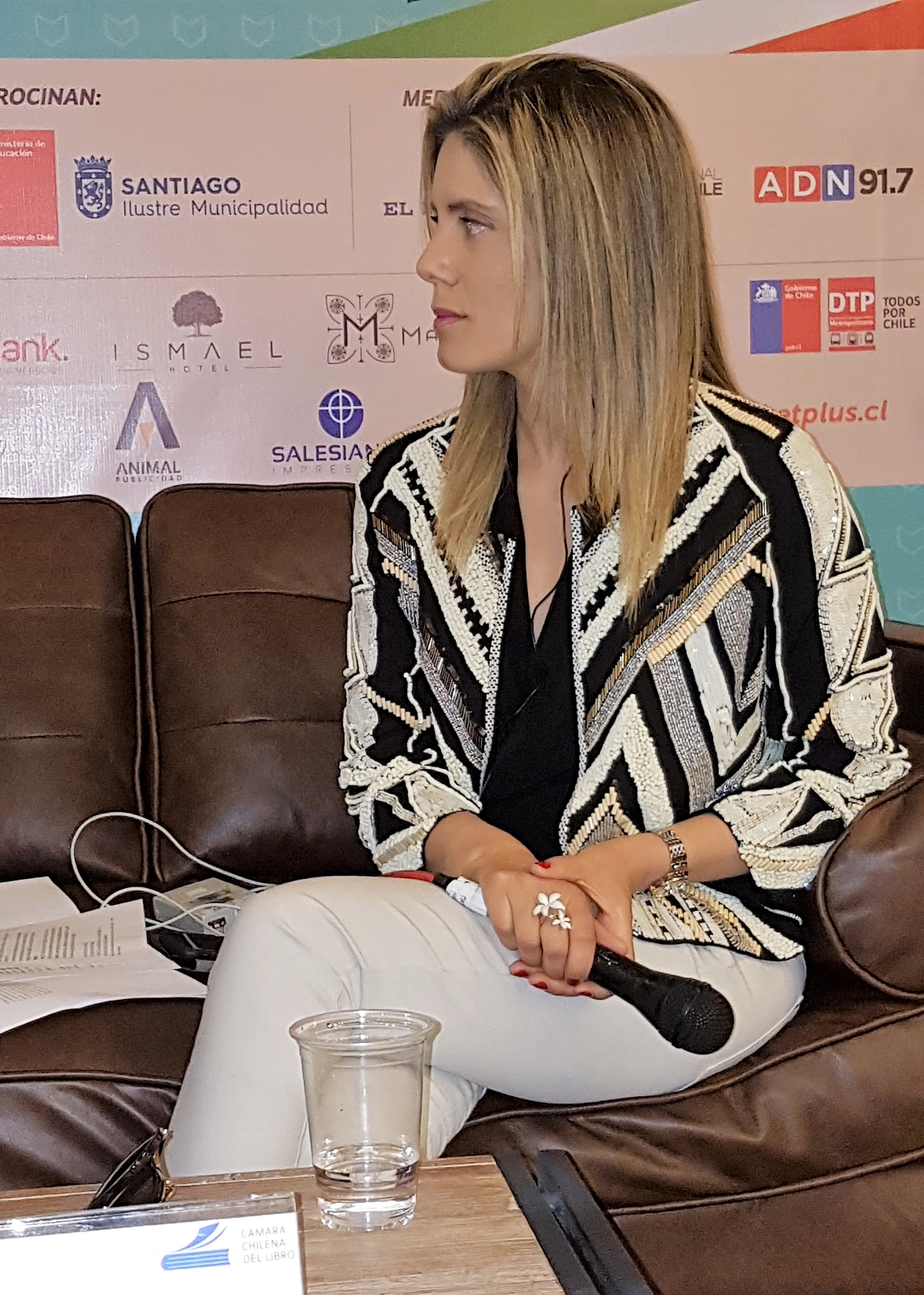 La periodista chilena Mónica Rincón en la Feria Internacional del Libro de Santiago 2017.